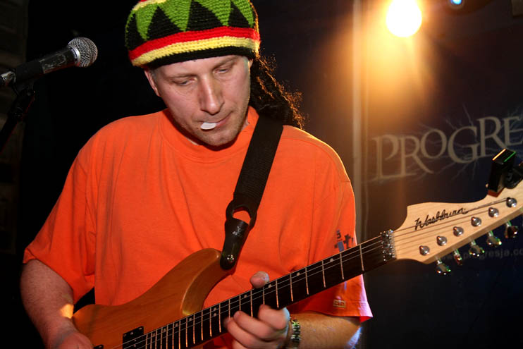 Kuba Sienkiewicz w czasie występu zespołu Zuch Kozioł (reaktywacja zespołu, zwanego wcześniej SPIARDL (Stowarzyszenie Piosenkarzy i Artystów Robotniczych Działaczy Ludowych), po 22 latach na jeden koncert w składzie: Piotr Łojek, Mirosław Jędras, Kuba Sienkiewicz) w czasie Zacieralii 2009. W czasie Zacieralii 2010 zespół dał swój drugi koncert z dodatkowym udziałem DJ Mruffki na perkusji.